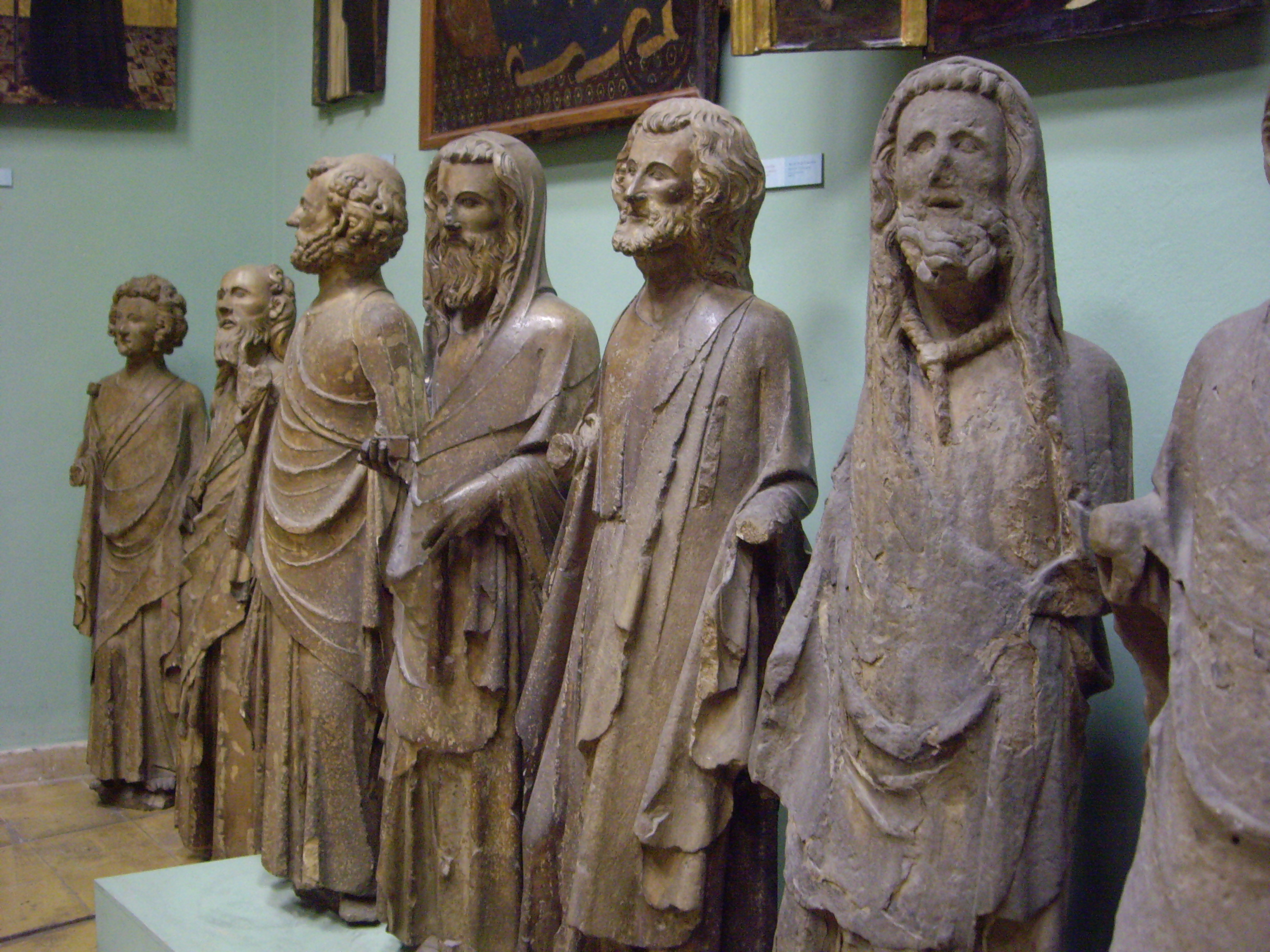 Grup dels Apòstols originals.